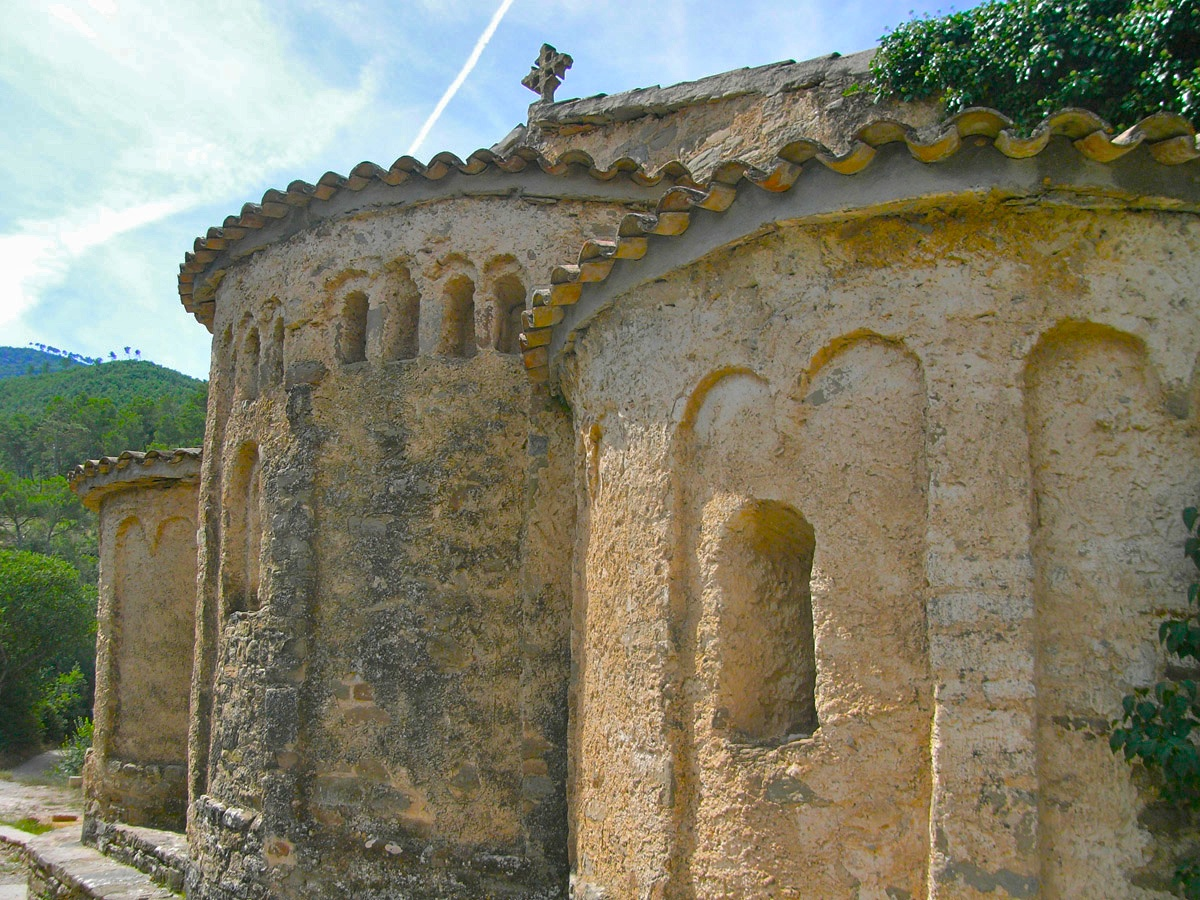 Àbsis de Sant Julià de Coaner